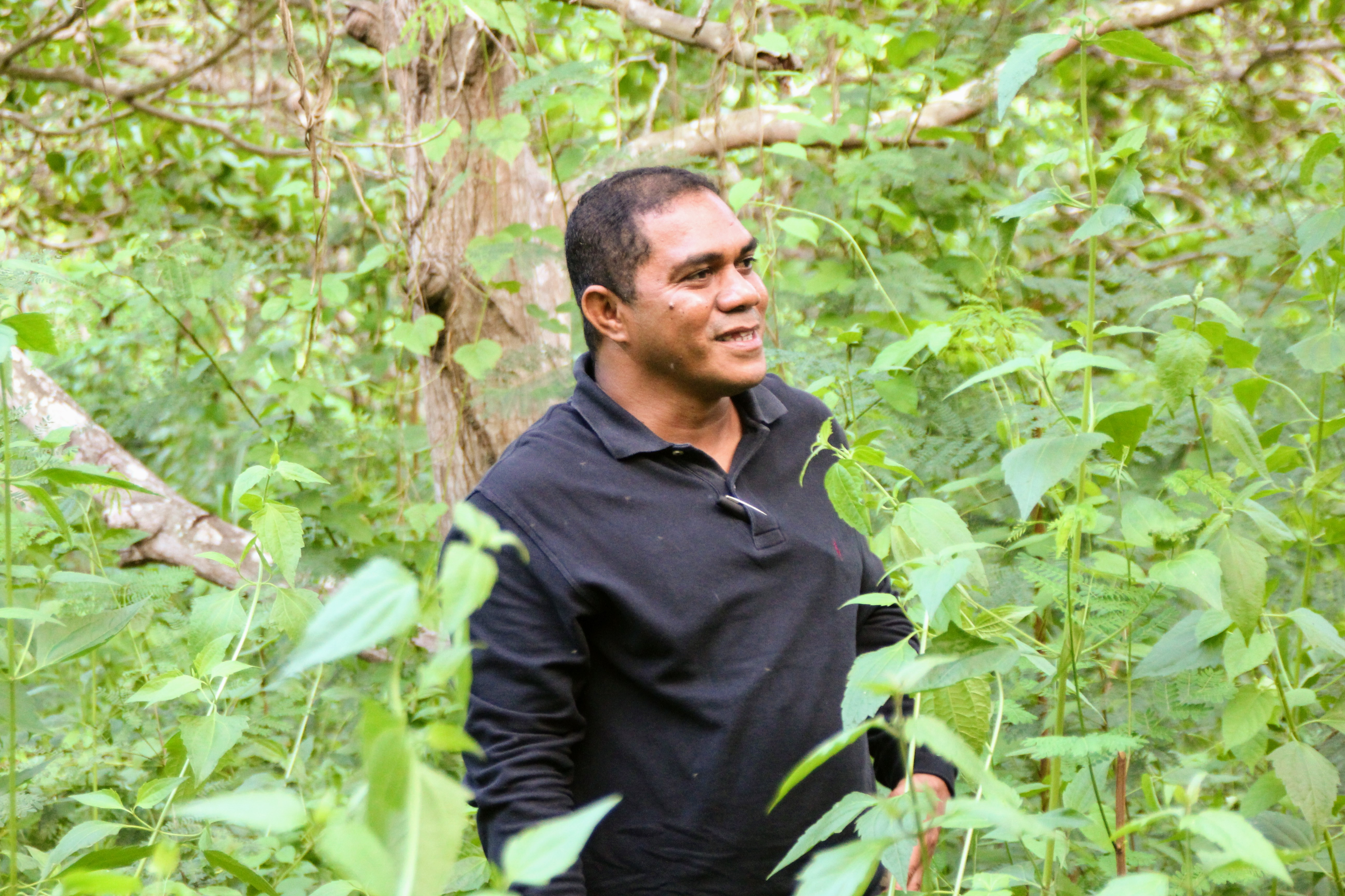 Cita-cita Kecil Si Anak Desa